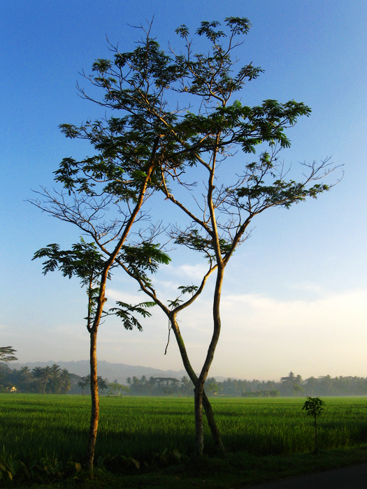 pohon Akasia